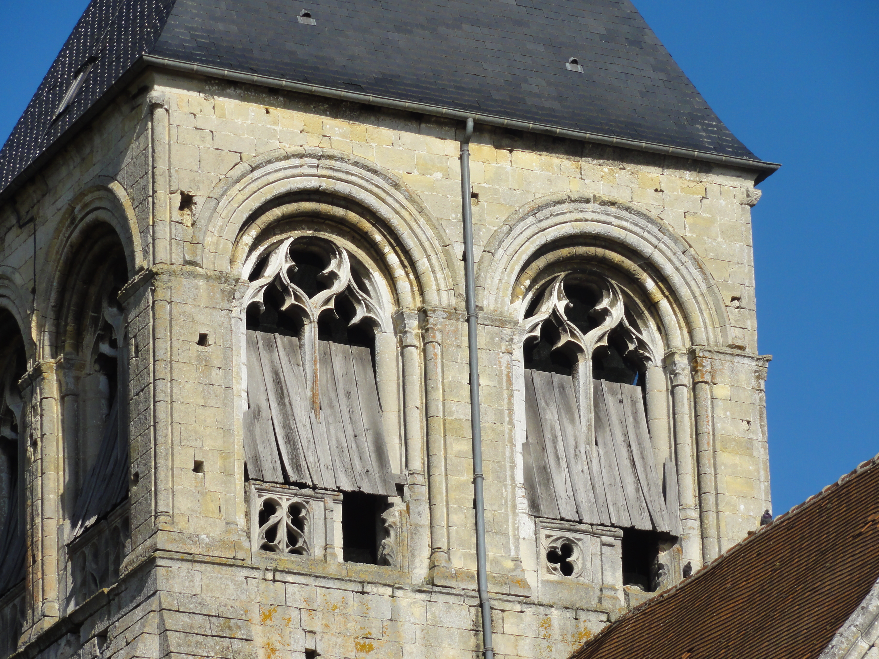 Clocher, étage de beffroi.